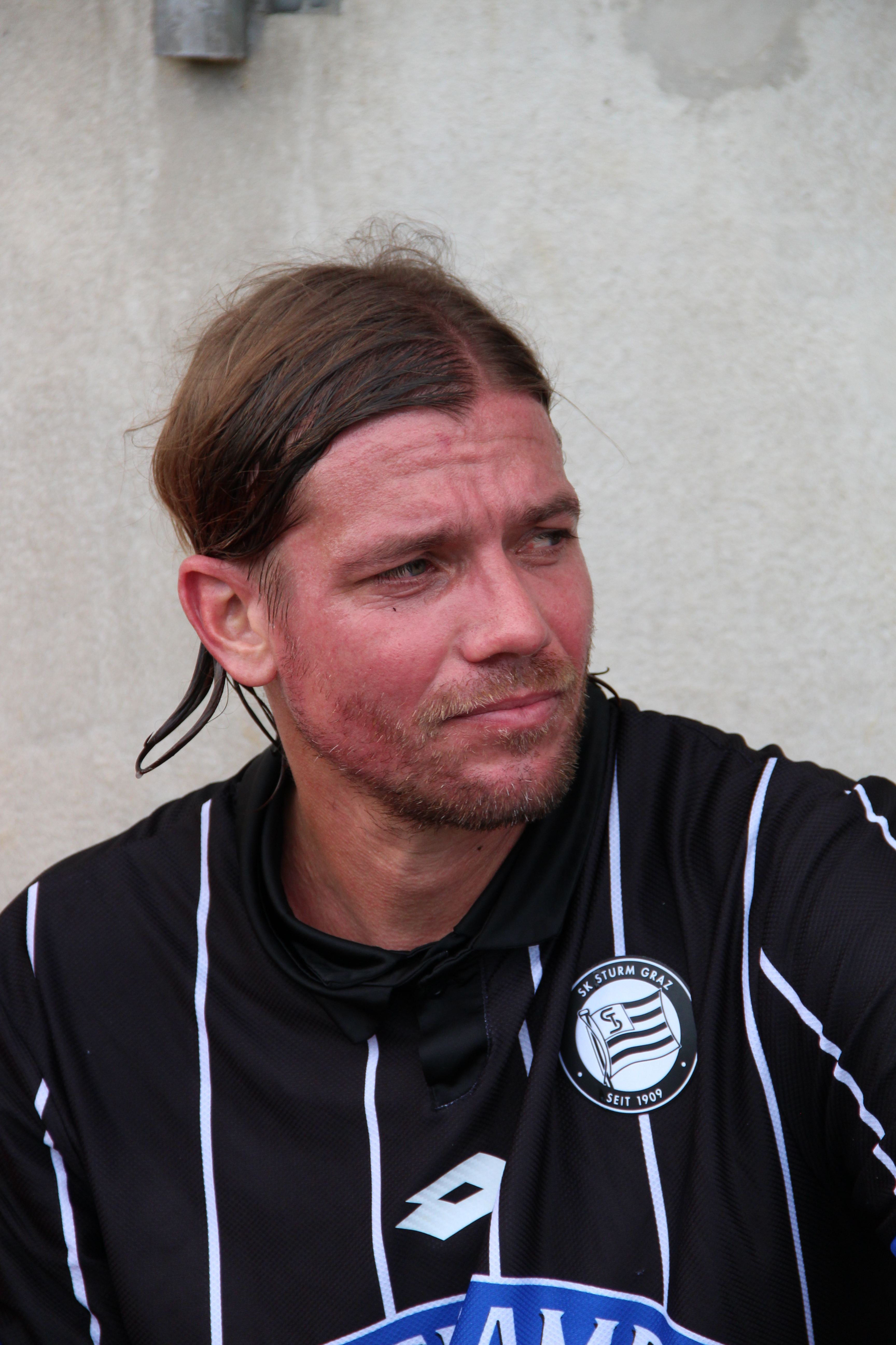 Zeltweger Legendenturnier 2018